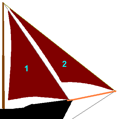 Zelf gemaakt Fok en KLuiver: bij de betreffende artikelen.